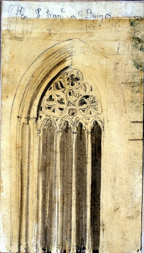 Ventanal gótico del desaparecido monasterio de San Francisco de Burgos, provincia de Burgos, (España). El dibujo pertenece a la colección del Museo Lázaro Galdiano de Madrid.